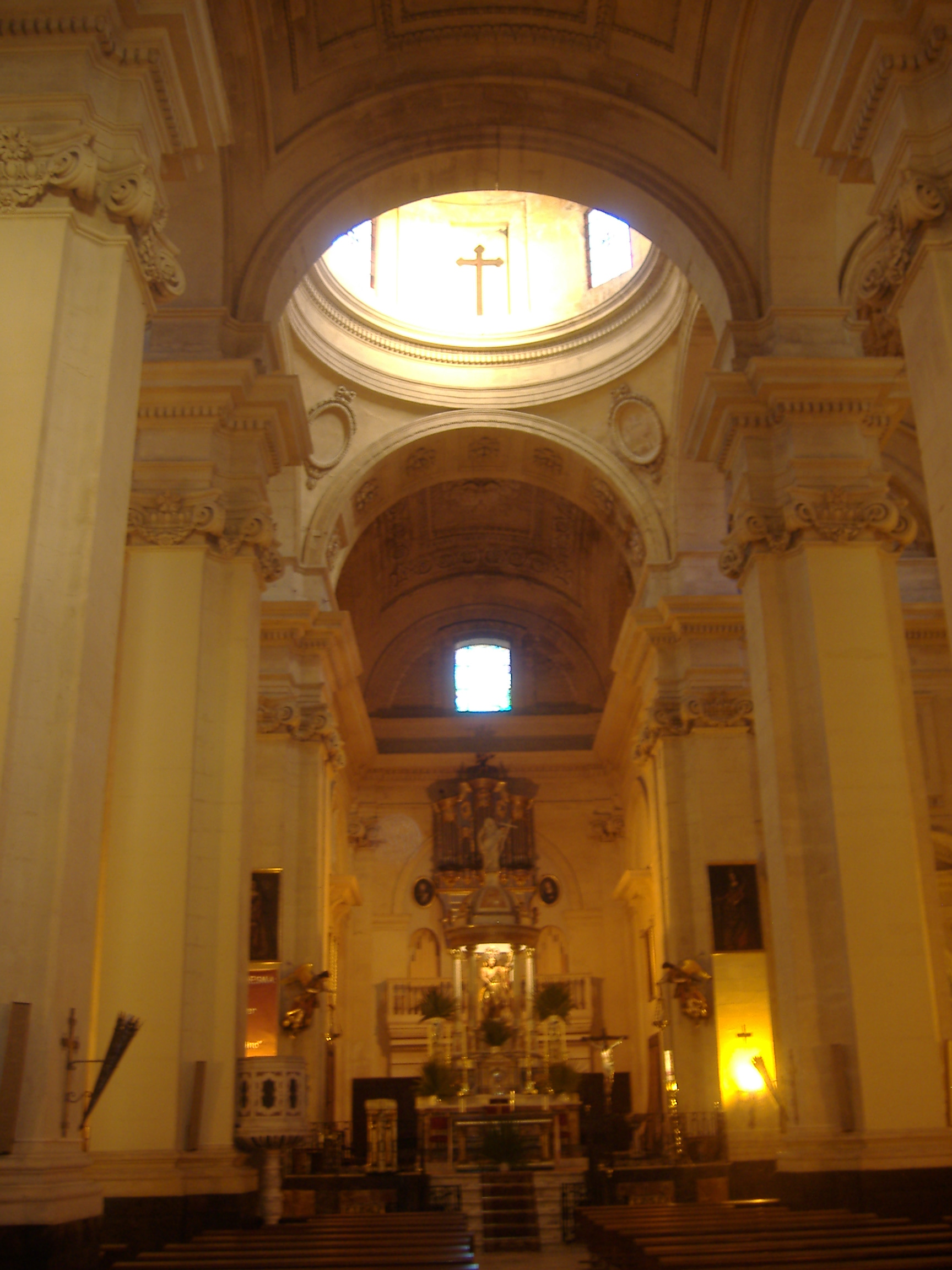 Nave central de la Iglesia, cúpula sobre el crucero y presbiterio